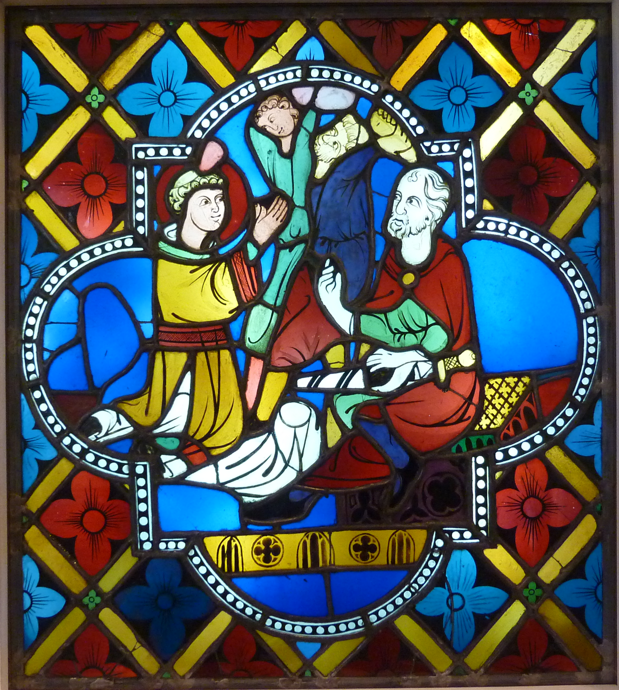 Museum Schnütgen in Köln, Bleiglasfenster mit der Darstellung: "Steinigung des hl. Stephanus aus einem Stephanuszyklus" (In. N: M 524)